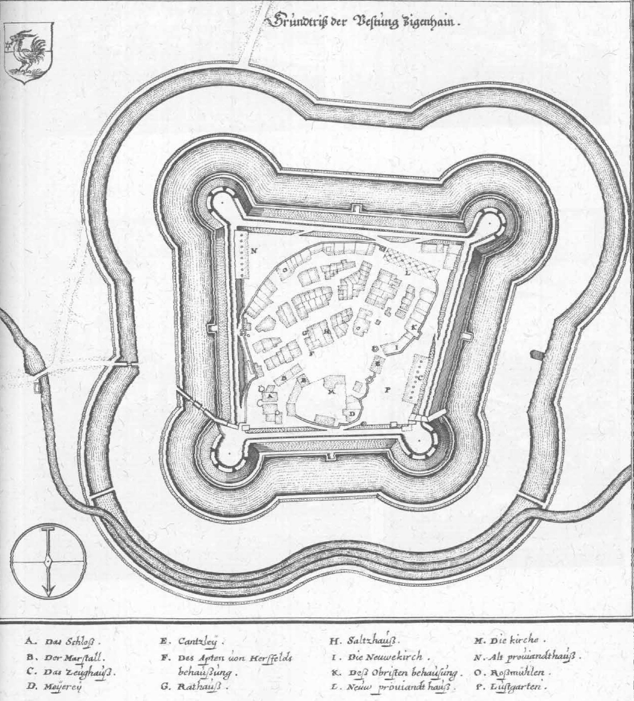 Grundriss der Festung bzw. der Stadt Ziegenhain im Jahr 1655